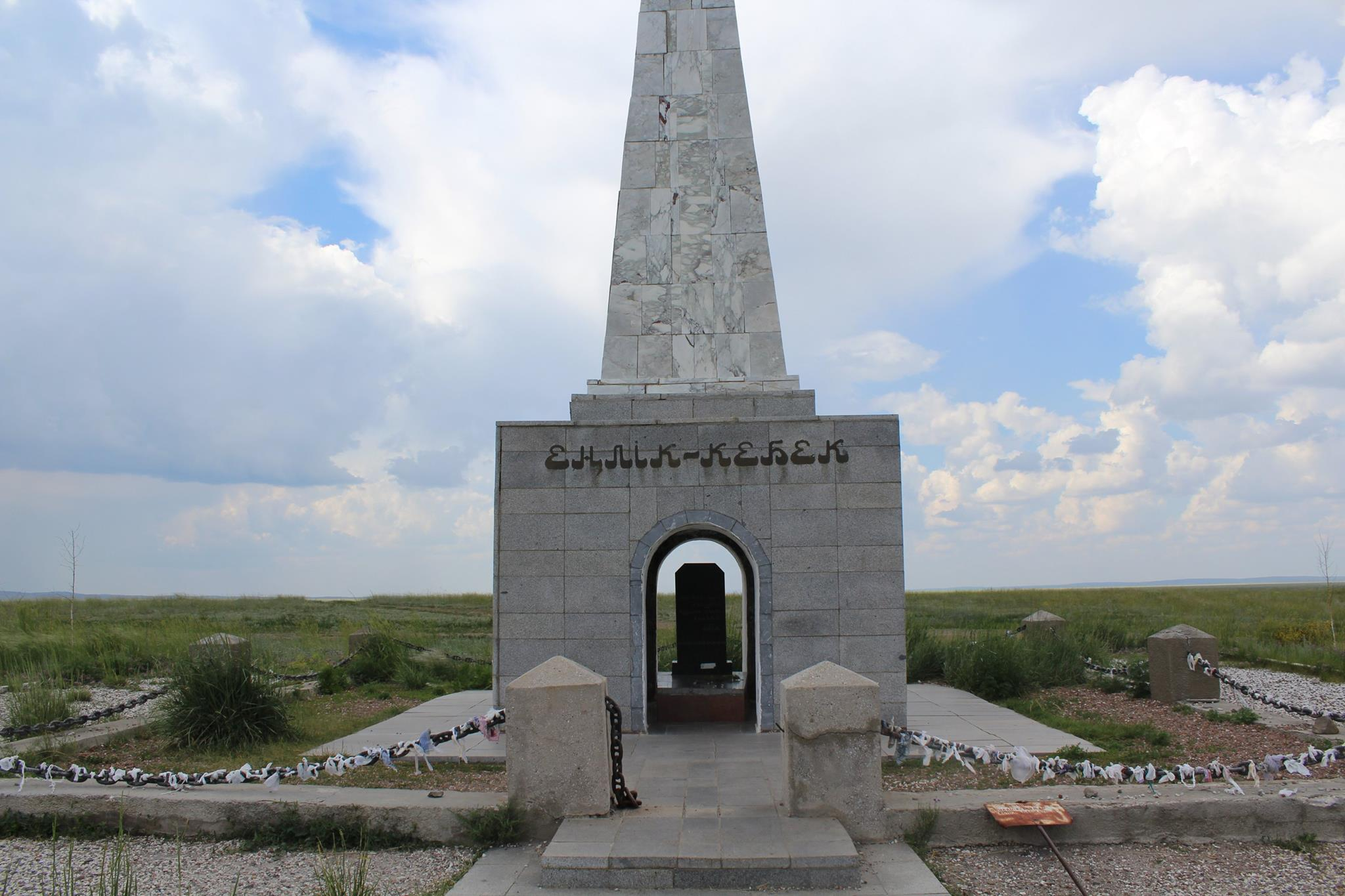 Қазақша (кирил): Қос ғашық Еңлік пен Кебек зиратына қойылған ескерткіш мұнара